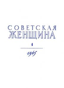 Обложка первого номера журнала "Советская женщина", январь, 1945 г.